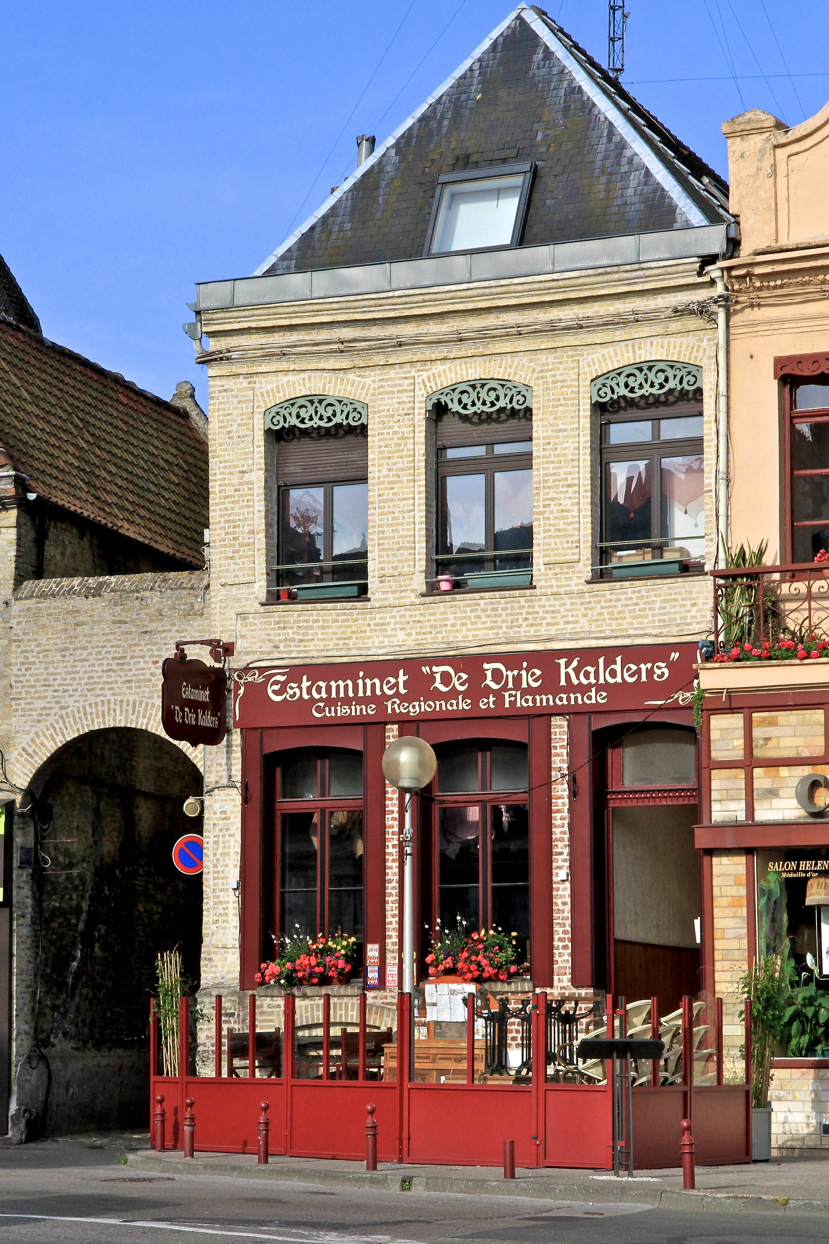 Estaminet "De Drie Kalders", Saint-Omer